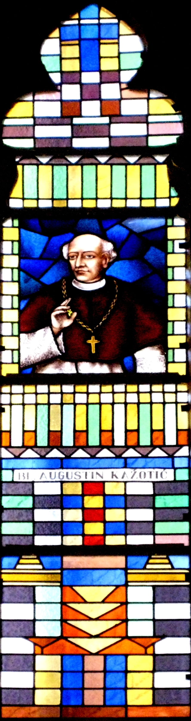 vitraj blaženog Augustina Kažotića u crkvi Gospe Lurdske, Rijeka